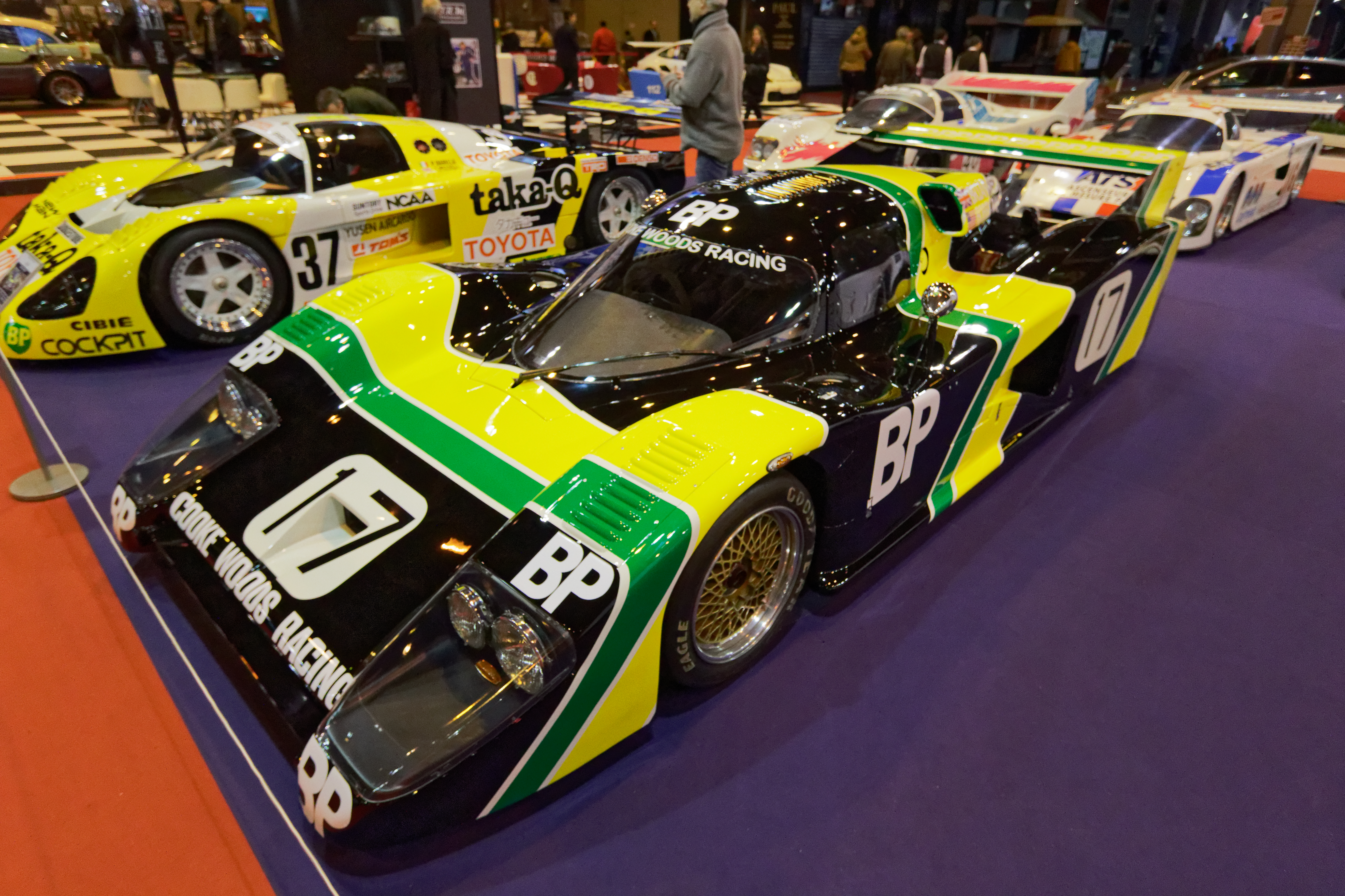 Une Lola T600 de 1981 exposée lors du salon Rétromobile 2018.